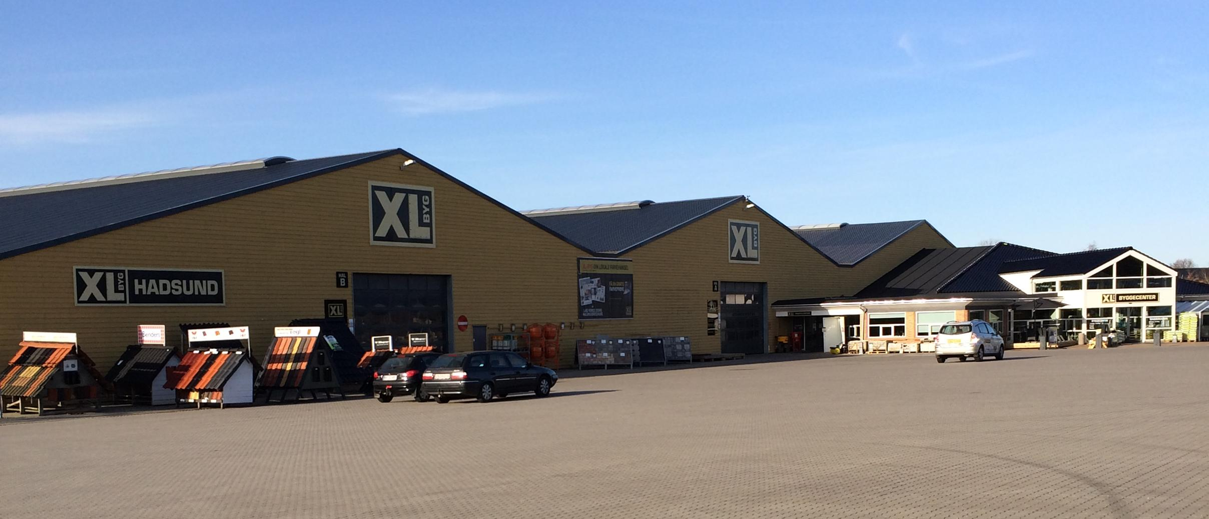 XL-Byg i Hadsund